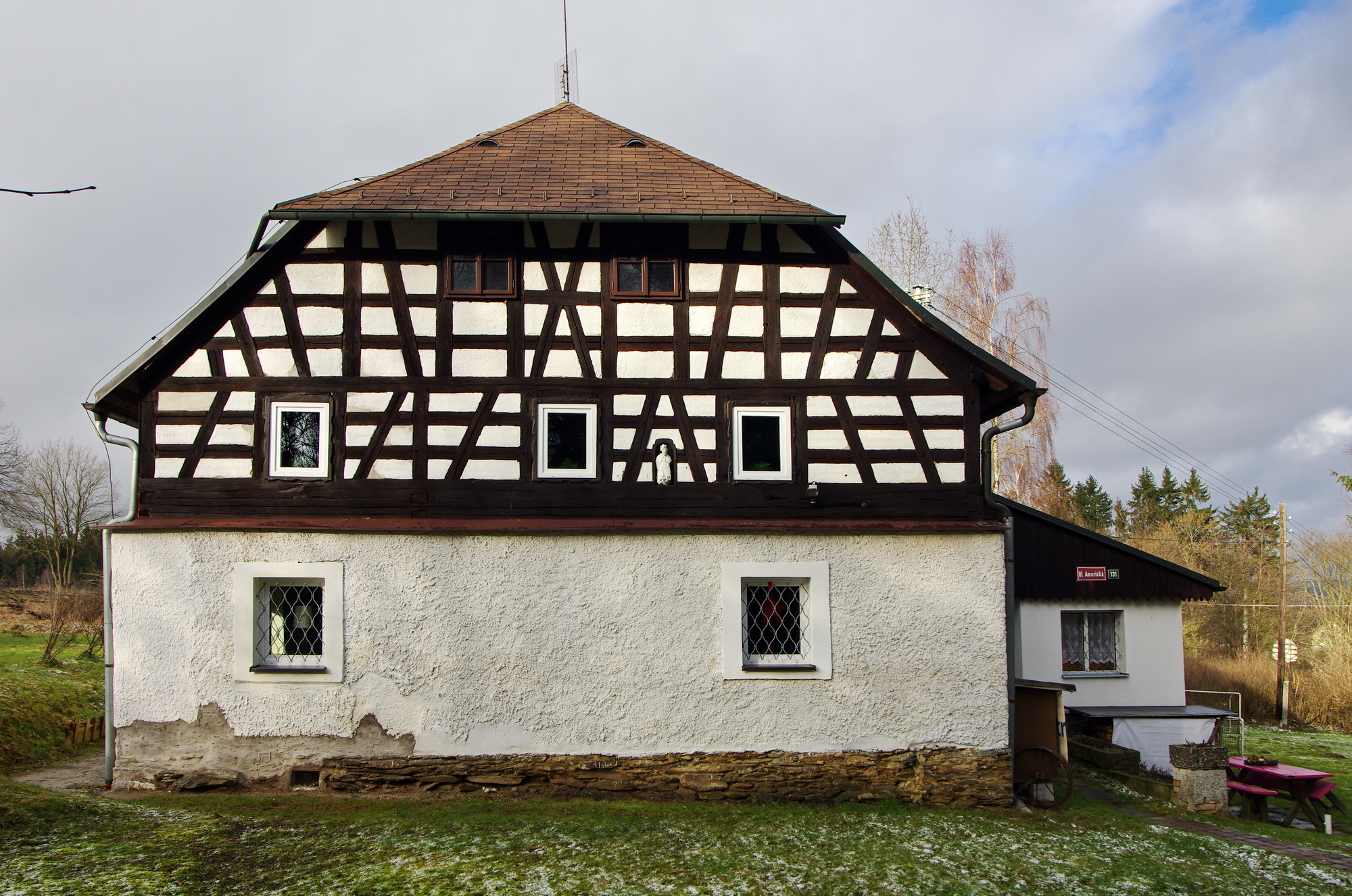 Loučná, součast obce Jindřichovice, Krušné hory, okres Sokolov